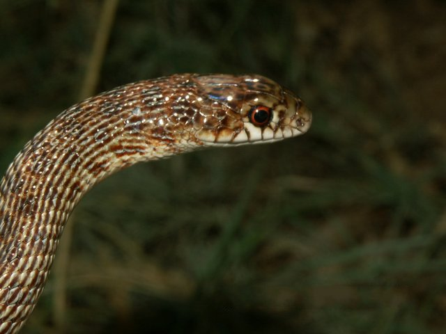 Dolichophis schmidti